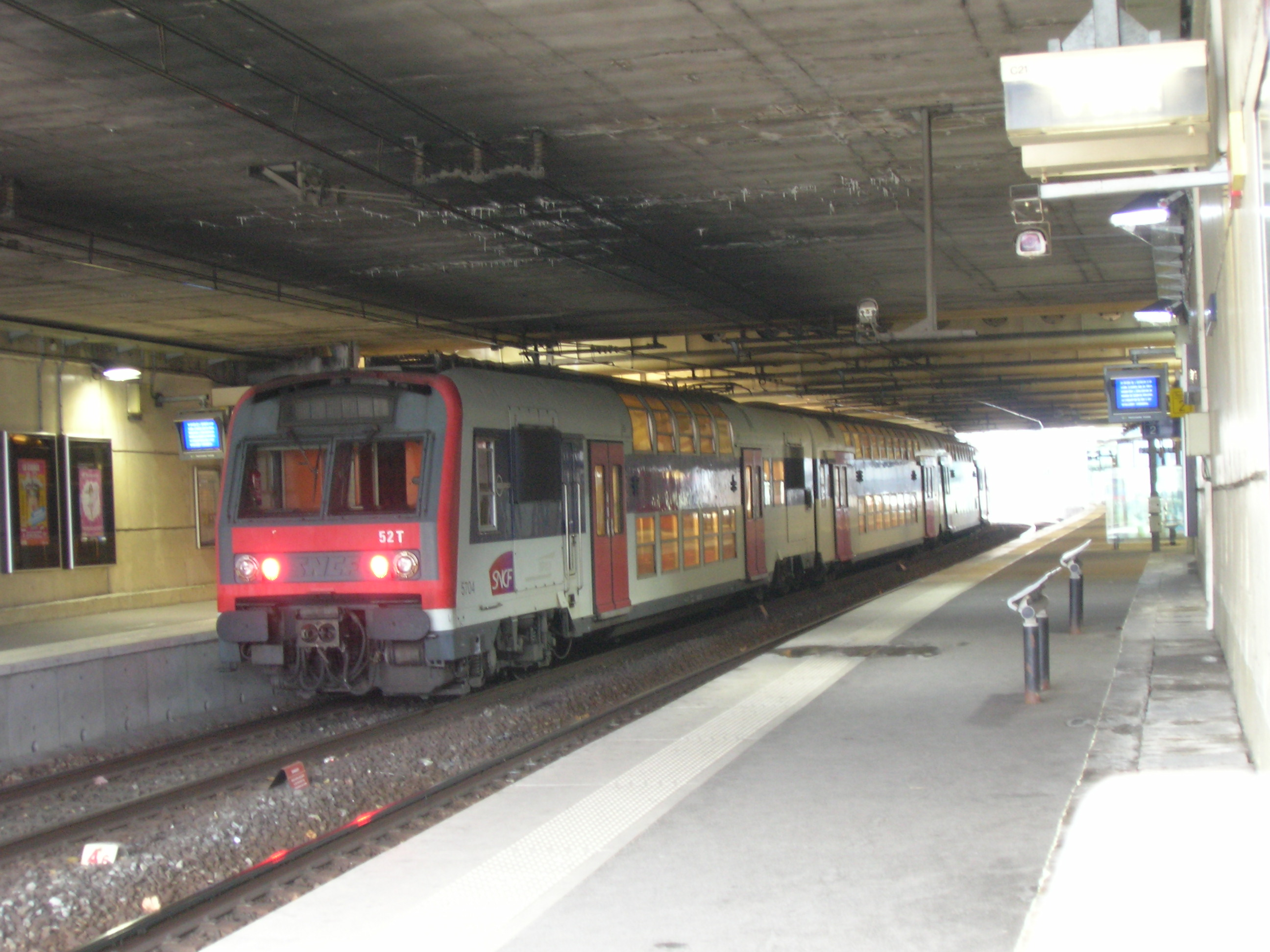 Gare Boulevard Victor côté quais